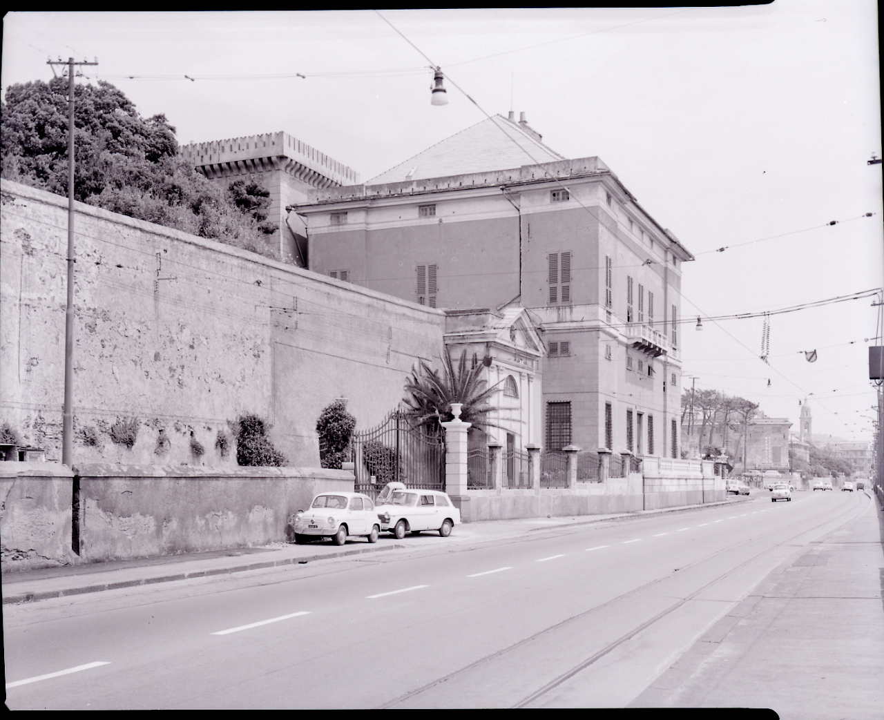 Servizio fotografico : Genova, 1964 / Paolo Monti. - Buste: 2, Fototipi: 2 : Negativo b/n, gelatina bromuro d'argento/ pellicola ; 10x12. - ((Serie costituita da 2 buste sciolte di negativi identificati con i nn.: 8331, 8335. - Il negativo identificato con il numero 46397 è stato realizzato per Zodiac. - Occasione: Documentazione per la pubblicazione: Italia Nostra (a cura di), "Le ville genovesi", catalogo della mostra, Genova 1962, Genova, Comune di Genova, 1967. - Fonte: Monografia di Italia Nostra (a cura di): Le ville genovesi, catalogo della mostra, Genova 1962, Genova, Comune di Genova (1967). - Fonte: Lettera di Paolo Monti: I. Carteggi/ Genova - Enrico (1963-1966), presso Archivio Paolo Monti. Camicia con documenti dattiloscritti e manoscritti vari relativi al lavoro eseguito per Italia Nostra: preventivi, lettere, inventari. - Fonte: Agenda di Paolo Monti: Monti/ 2/ 6 giugno 1964 - 31 marzo 1966/ 8194-12420 (1964-1966), presso Archivio Paolo Monti